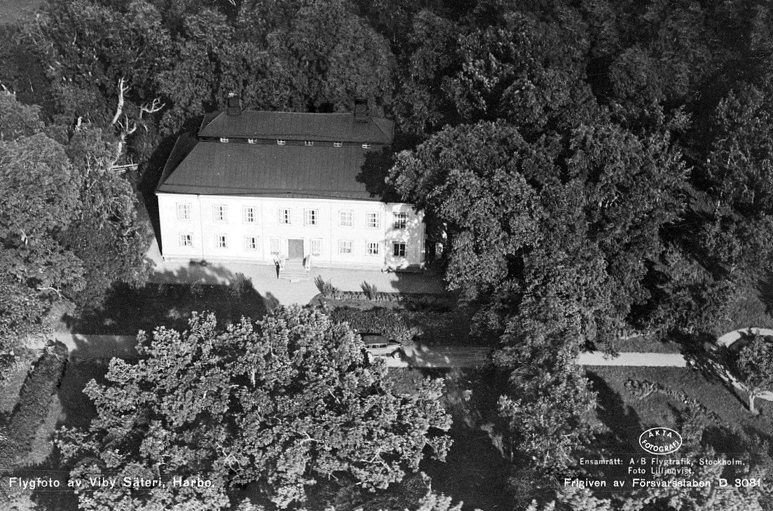 Flygfoto över Viby säteri, Harbo socken, Uppland 1936